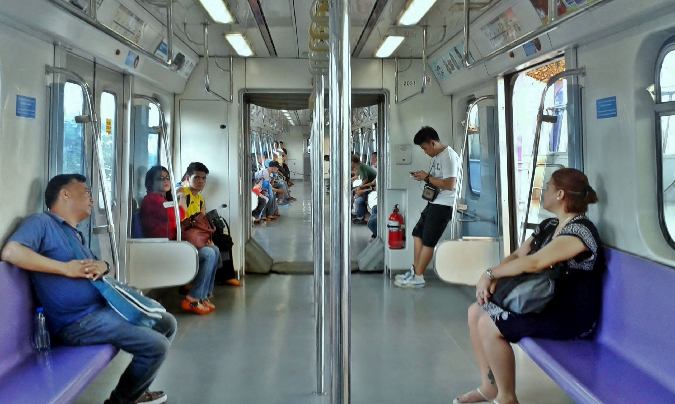 Inside a Manila MRT-2 Train